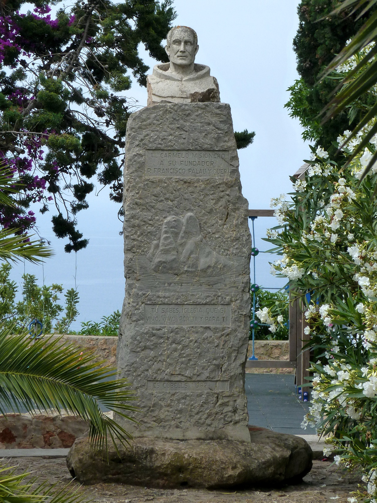 Büste des Geistlichen Francisco Palau y Quer auf einem Gedenkstein neben der Kirche "Església Nuestra Sra. Del Carmen" in Es Cubells, Ibiza, Spanien